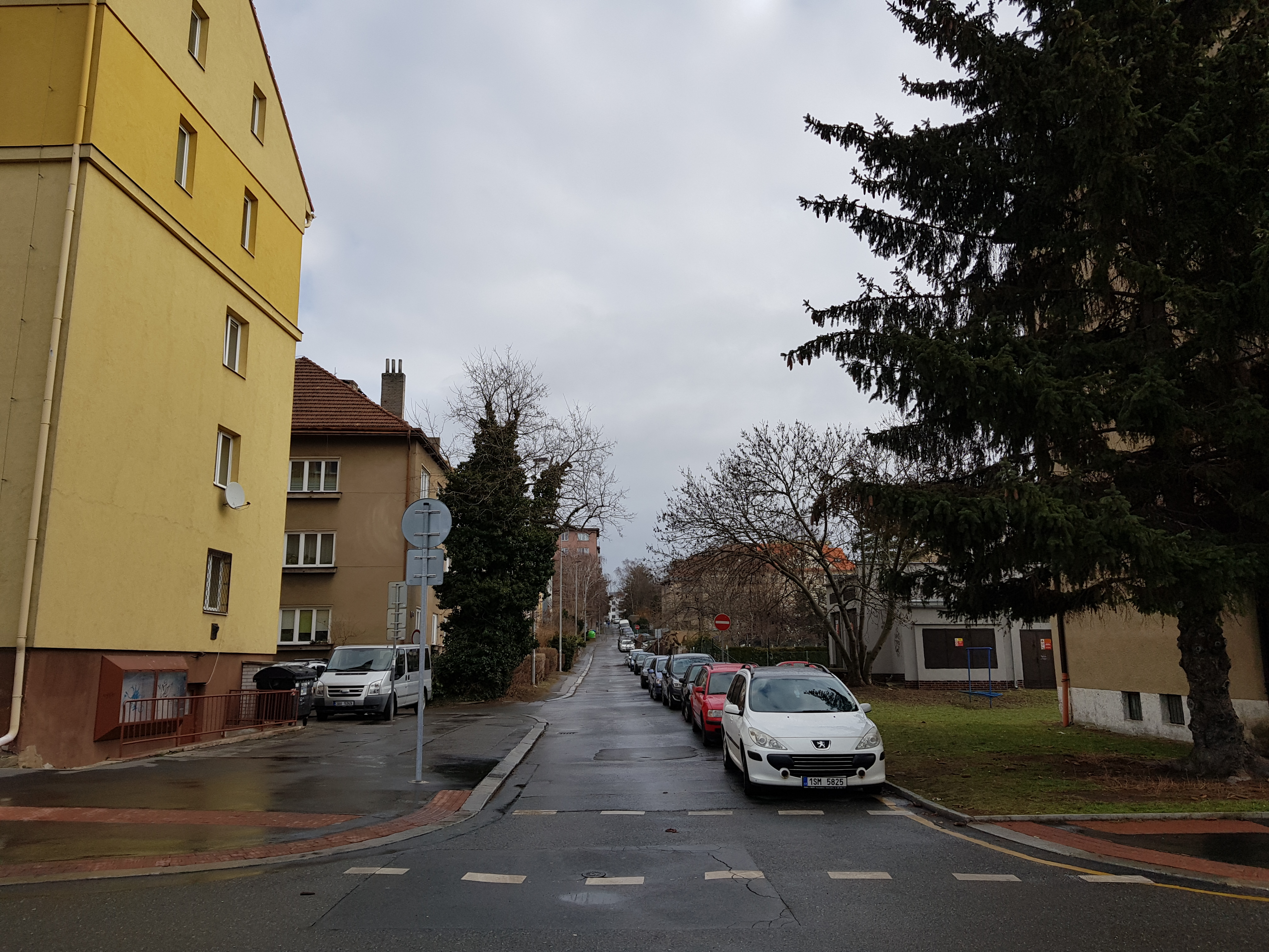 Horoušanská ulice, Praha 14 - Hloubětín, pohled od Chvalské